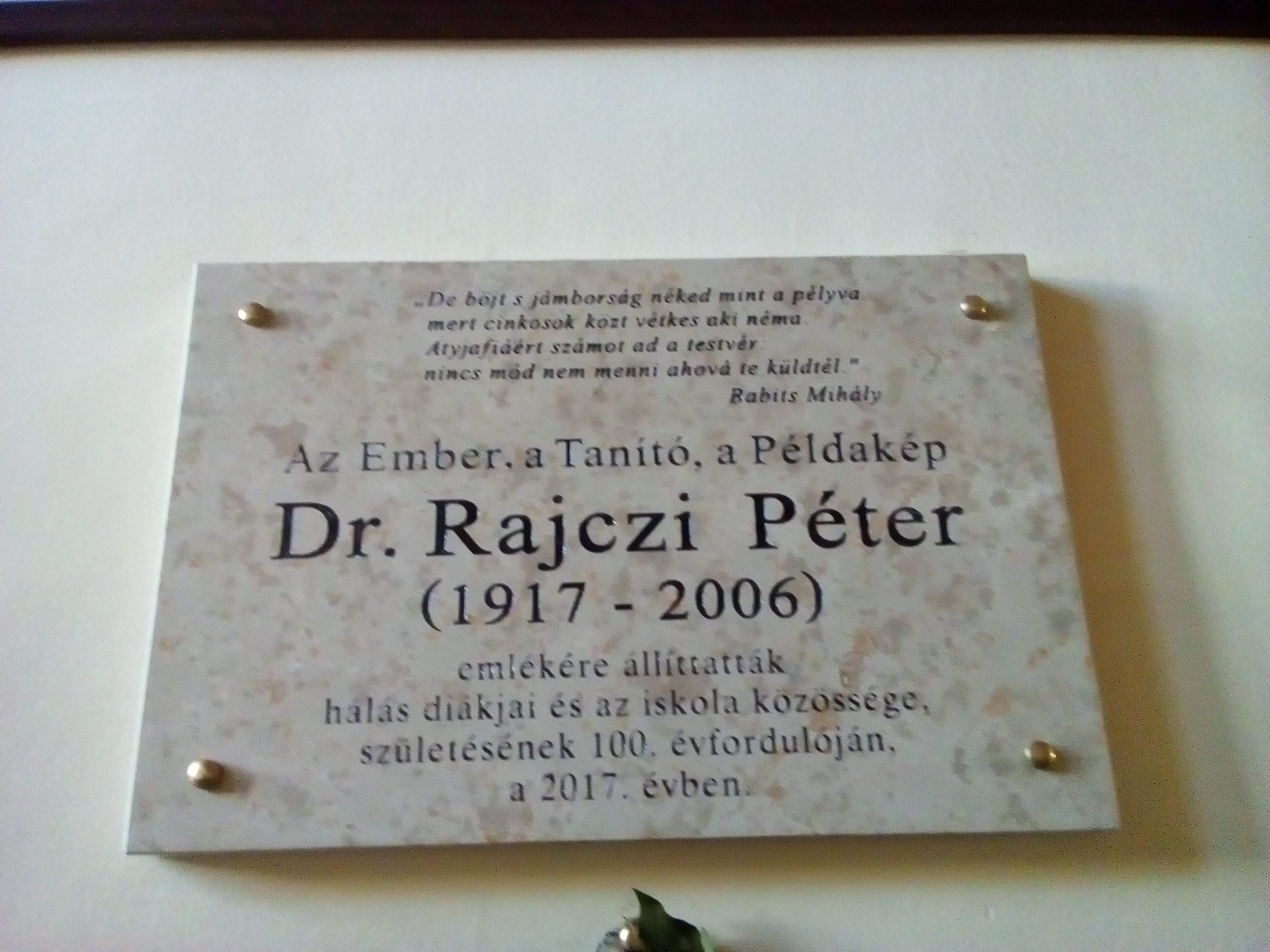 Rajczi Péter Pál emléktáblája (Ciszterci Rend Nagy Lajos Gimnáziuma és Kollégiuma, Pécs)